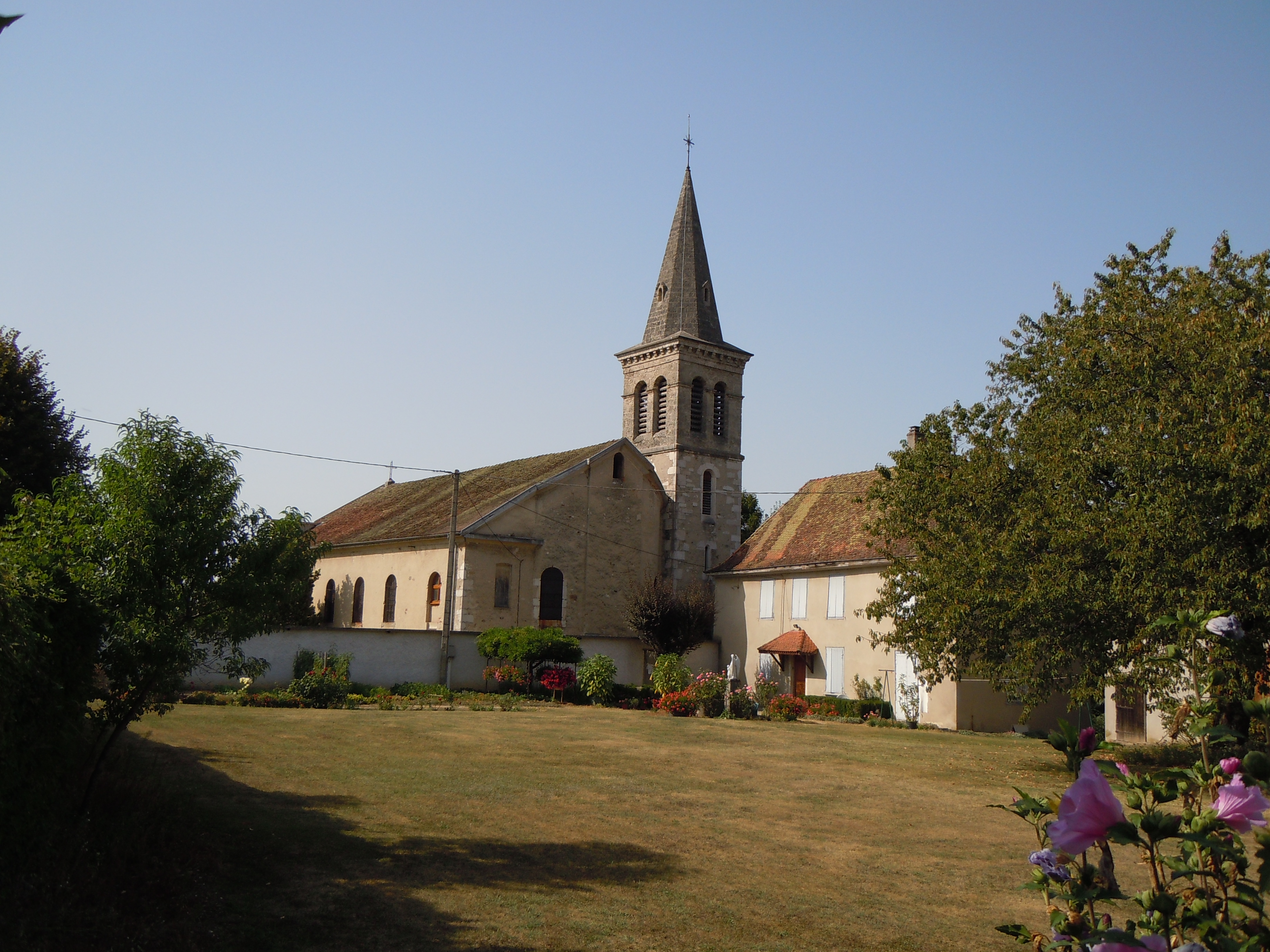 Eglise de Saint Albin de Vaulserre